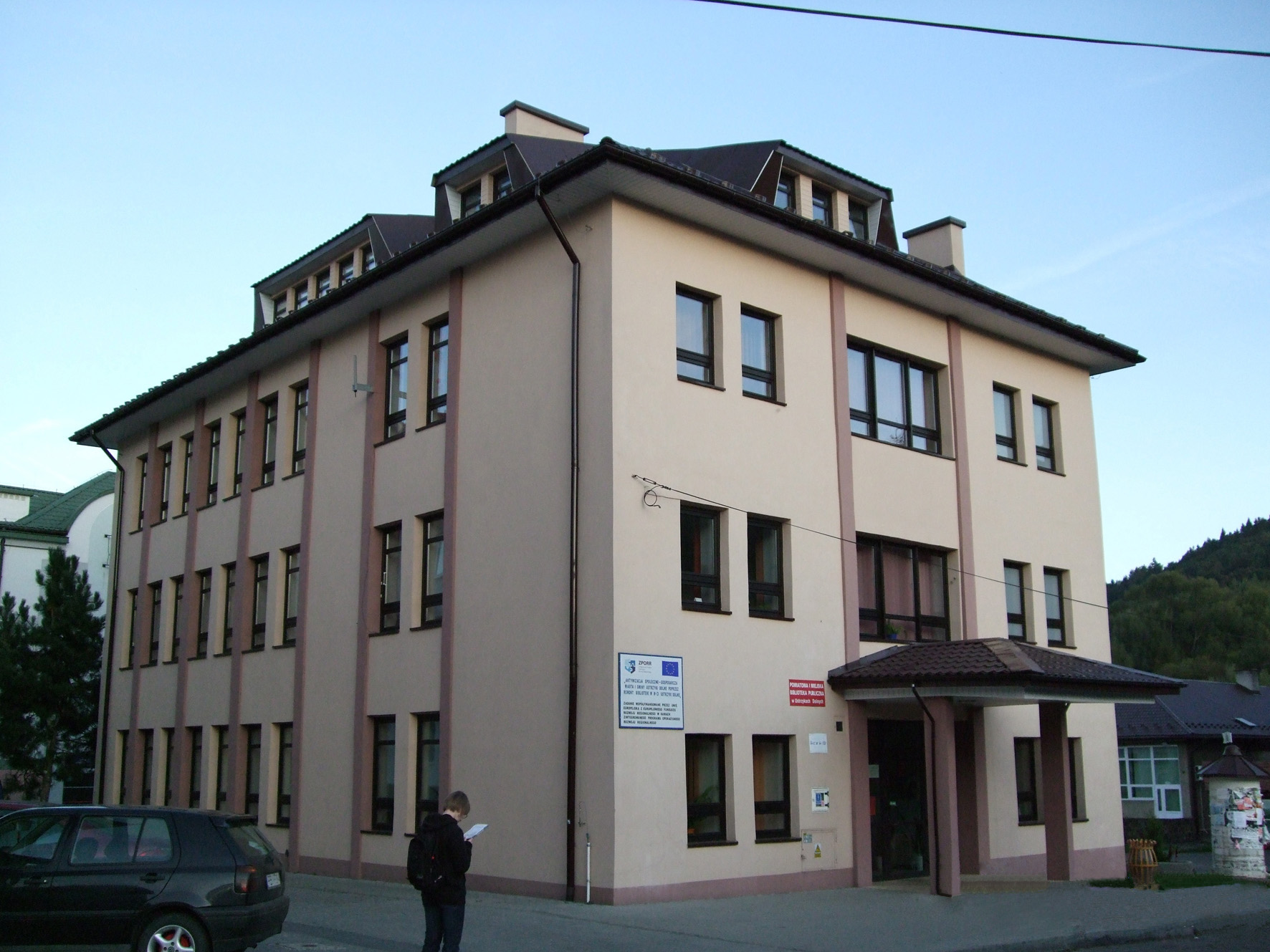 Biblioteka publiczna w Ustrzykach Dolnych, dawniej synagoga (zbudowana ok. 1870)